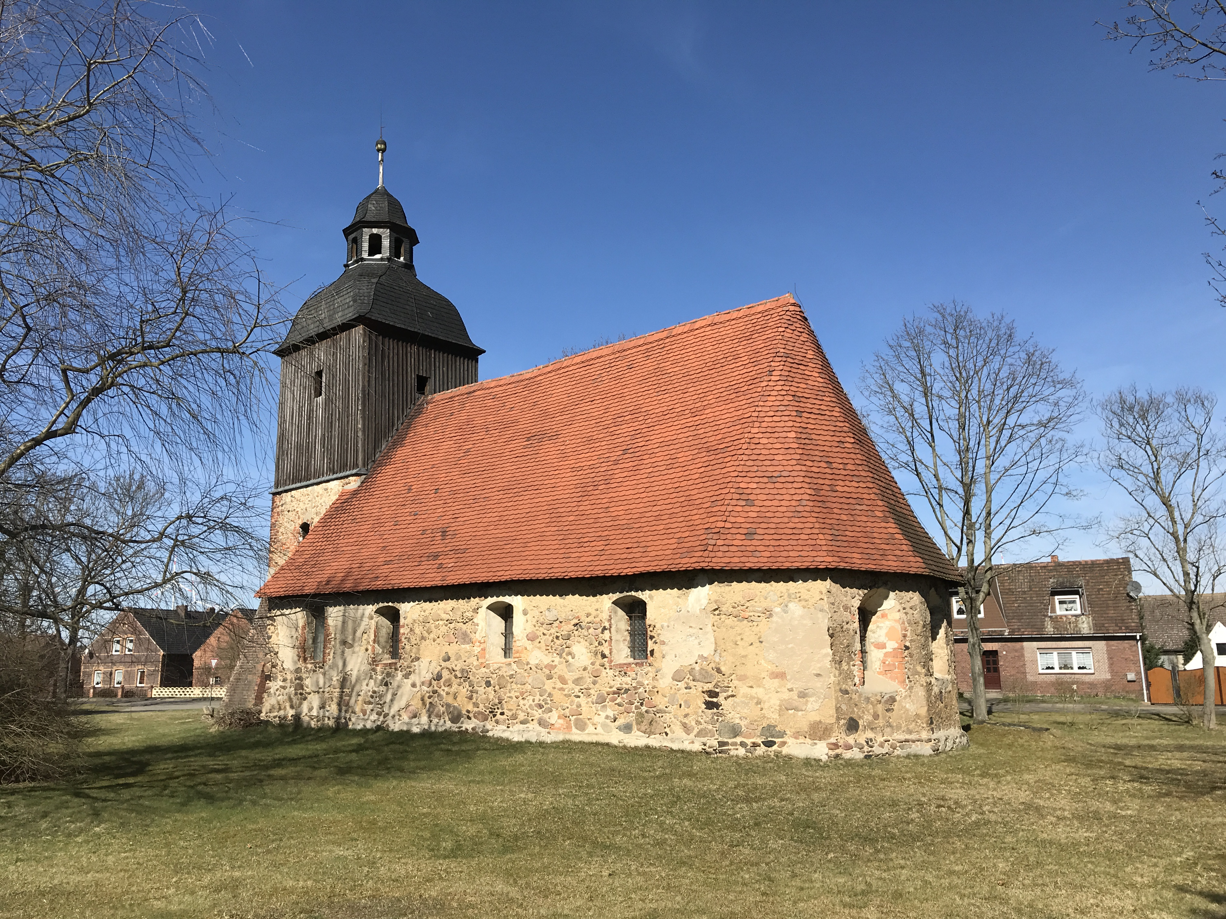 Die Dorfkirche in Kemmen der Stadt Calau entstand vermutlich im 15. Jahrhundert und wurde in den Jahren 1649 bis 1652 erneuert. Im Innern steht unter anderem ein Altaraufsatz von Andreas Schultze aus dem Jahr 1649.